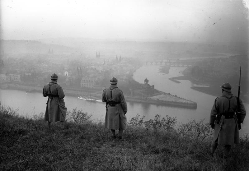 Die zweite Zone des besetzten Rheinlandes frei! Französische Truppen auf Ehrenbreitstein, nehmen Abschied von Coblenz a/Rh. Unten das Deutsche Eck.